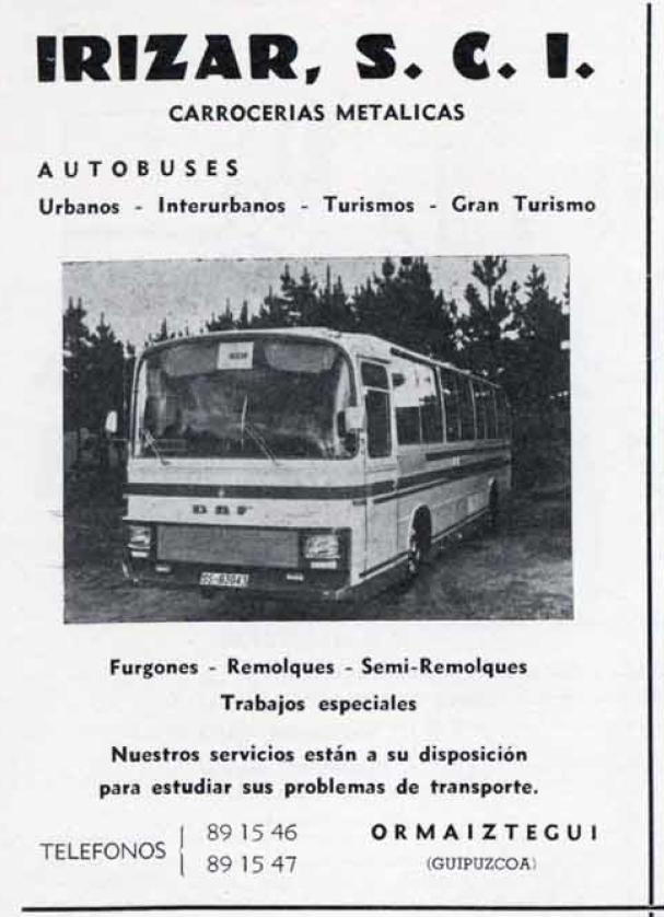 IRIZAR, S.C.I. CARROCERIAS METALICAS AUTOBUSES Urbanos - Interurbanos - Turismos - Gran Turismo Furgones - Remolques - Semi-Remolques Trabajos especiales Nuestro servicios están a su disposición para estudiar sus problemas de transporte TELEFONOS 891546 891547 ORMAIZTEGUI (GUIPUZCOA)